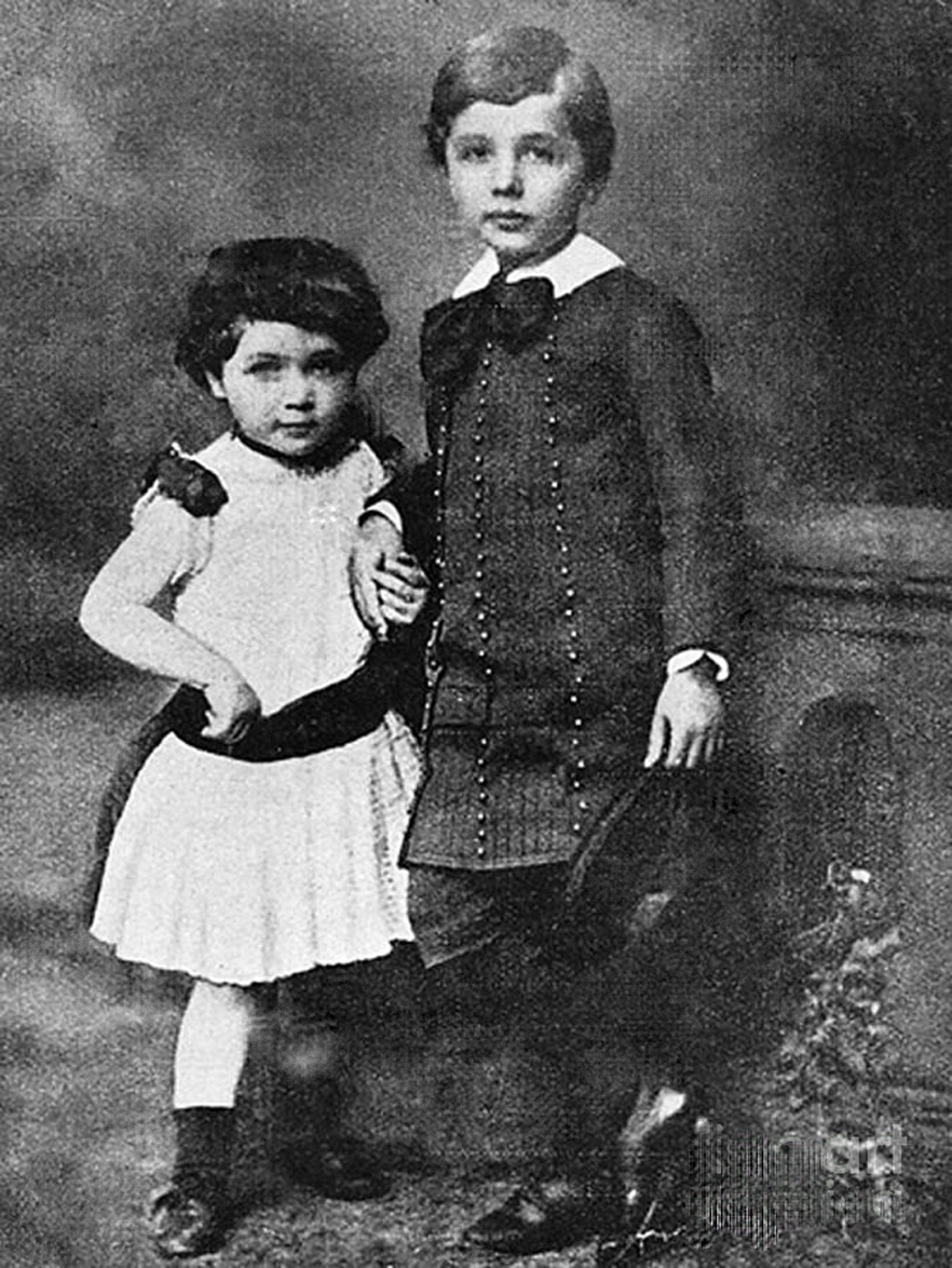 Albert con la sorellina Maja